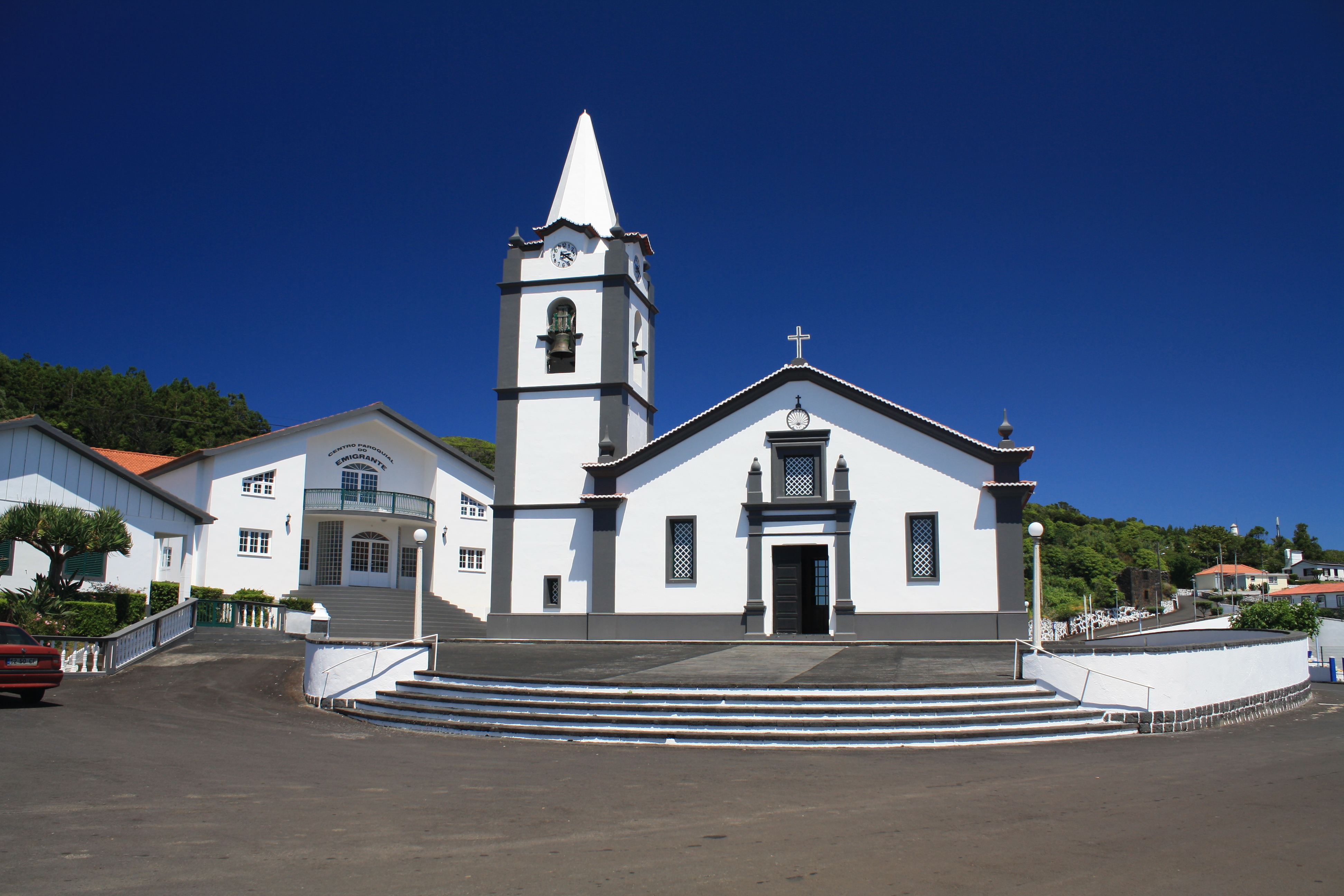 Kirche Igreja da Nossa Senhora do Rosário, Rosais, São Jorge, Azoren, Portugal